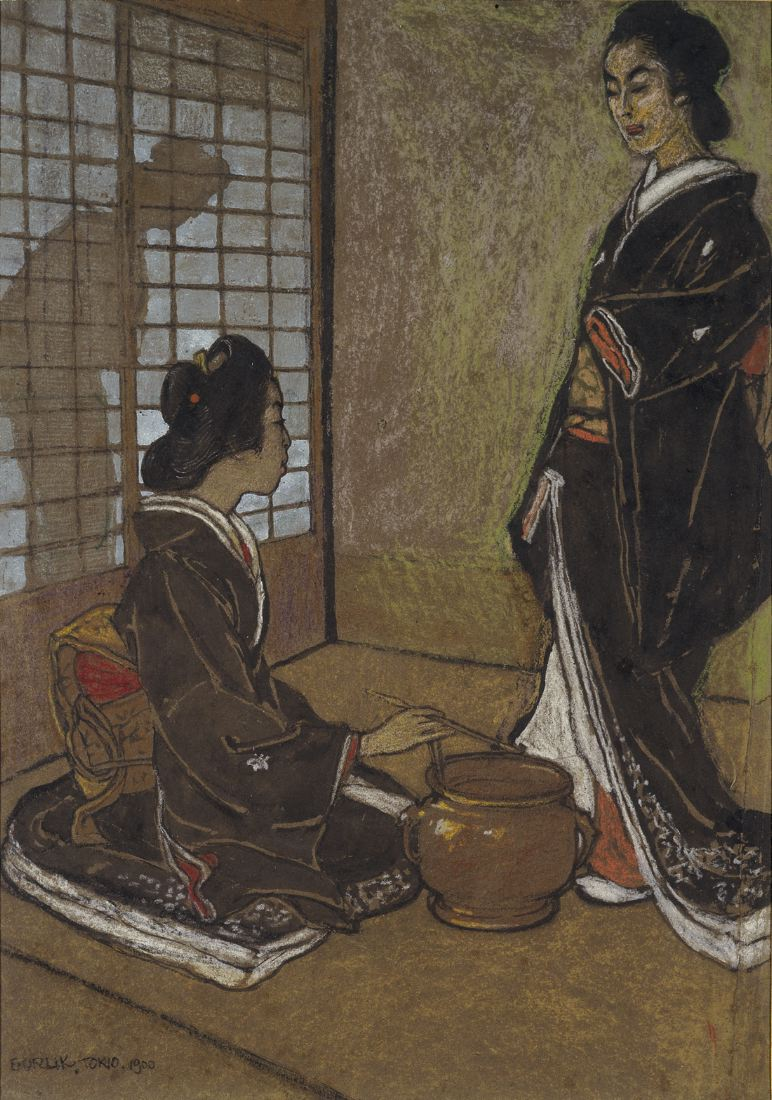 Zwei Geishas. 1900. Pastell und Deckweiß auf braunem, faserhaltigem Papier. Passepartoutausschnitt: 46 x 32 cm. Unten links signiert, bezeichnet und datiert: E·ORLIK. TOKIO. 1900. Provenienz: Ehemals Sammlung Antonín Dolezal, Prag (1944 von den Nationalsozialisten beschlagnahmt, 1950 von der tschechoslowakischen Regierung verstaatlicht und 2010 an die Erben restituiert)